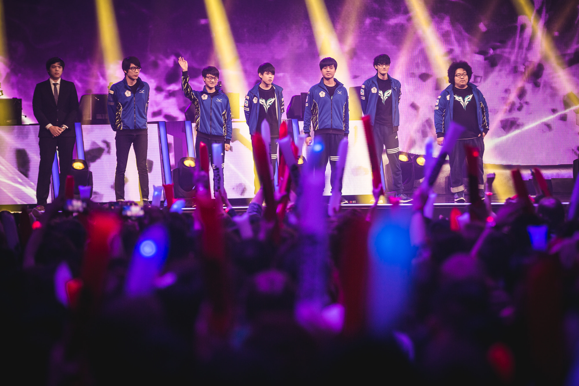 500px provided description: 1cun0098 Jpg [#lol ,#London ,#S5 ,#teamchina]